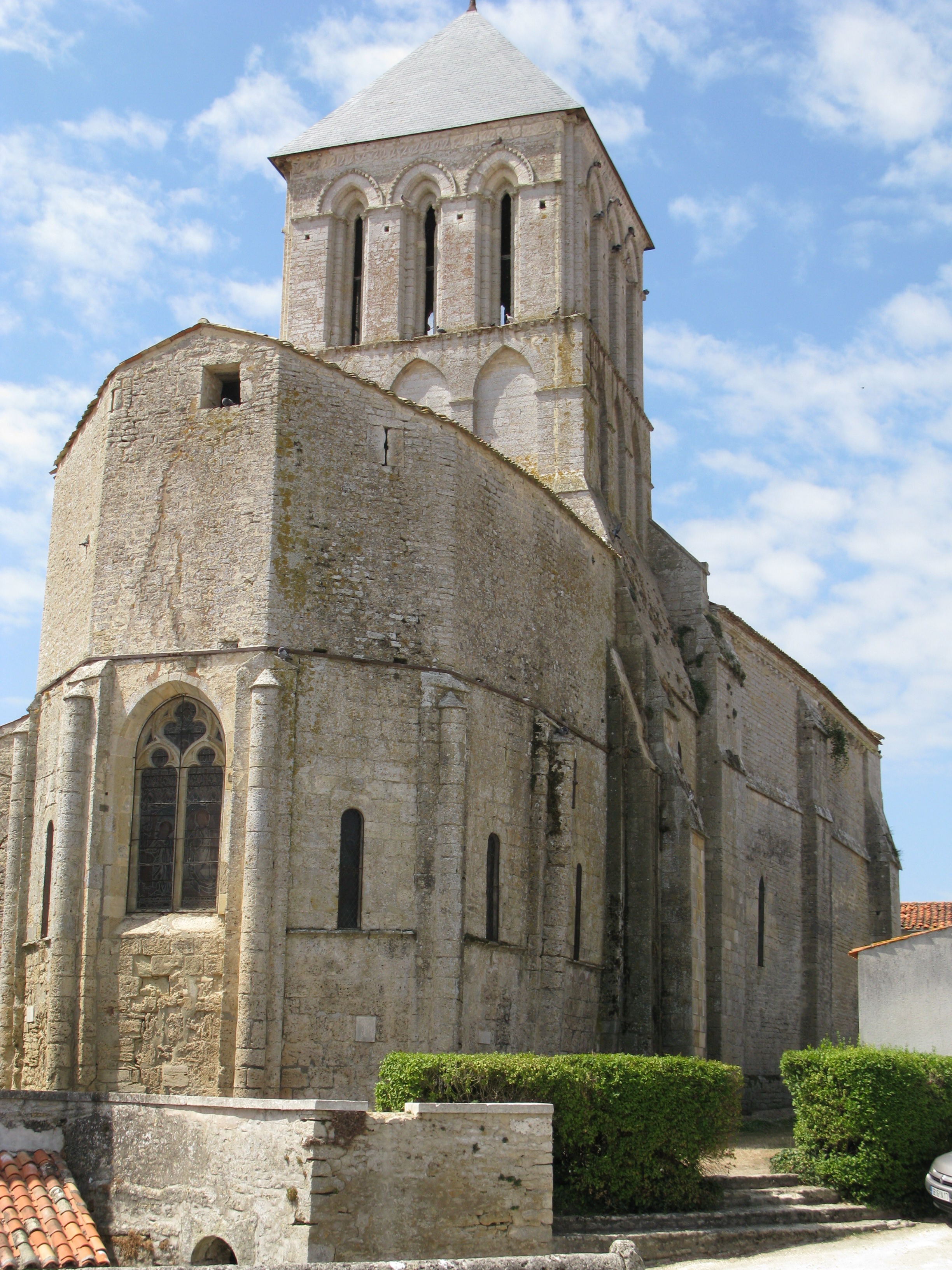 Vue arrière de l'église Saint-Vivien à Vandré.